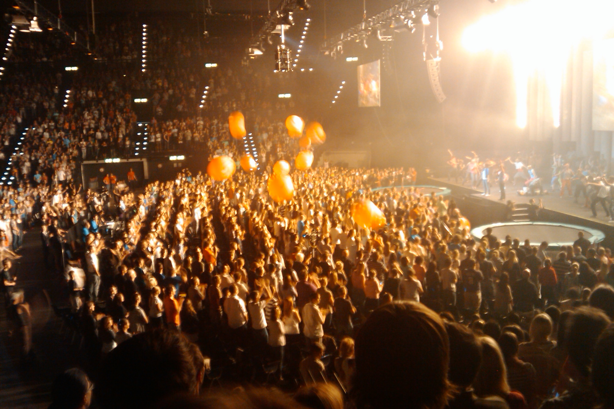 Hallenstadion Zürich Oerlikon Schweiz Corporation Event Juni 2011